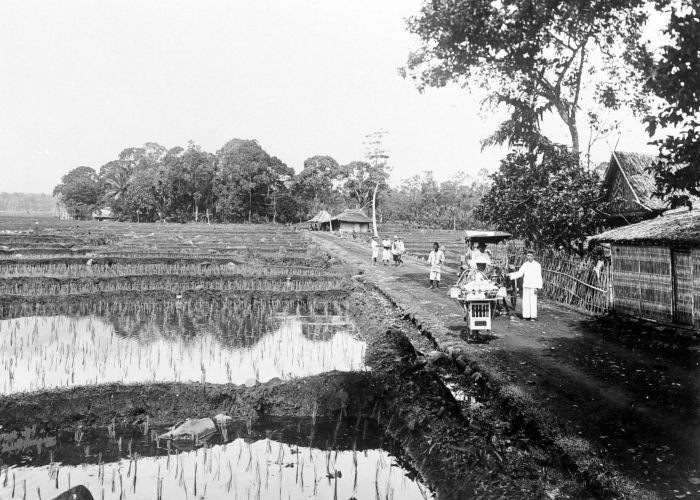 Repronegatief. De weg naar Kotabatoe, Buitenzorg